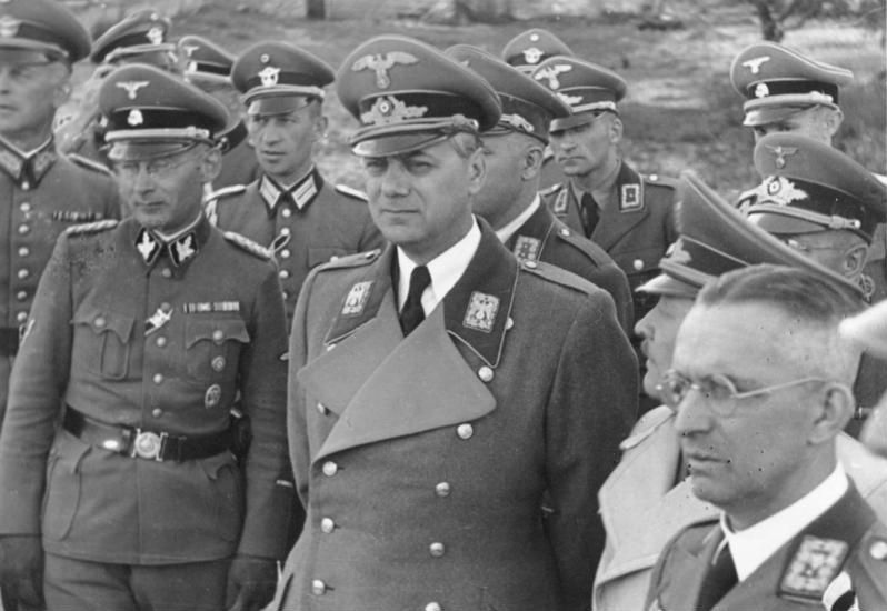 Besuch des Reichsleiters Rosenberg in Kiew